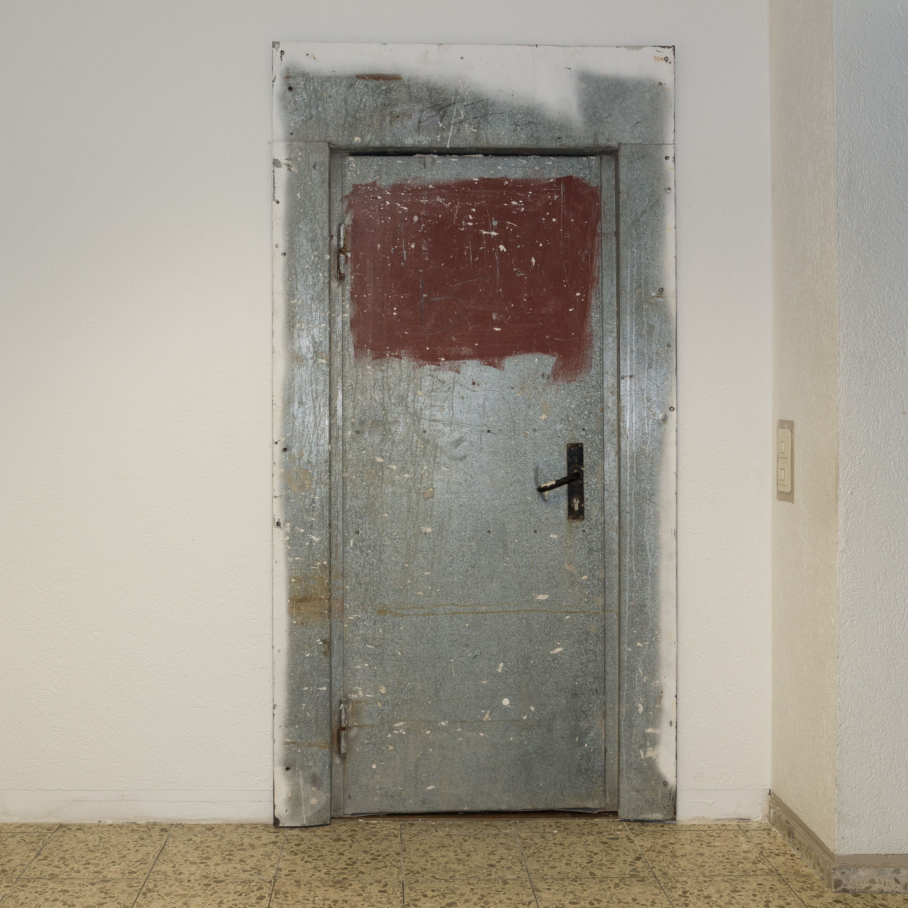 Bautür, provisorisch eingebaute Tür während einer Gebäudefertigstellung oder -renovierung, hier bei der Renovierung einer Etage.